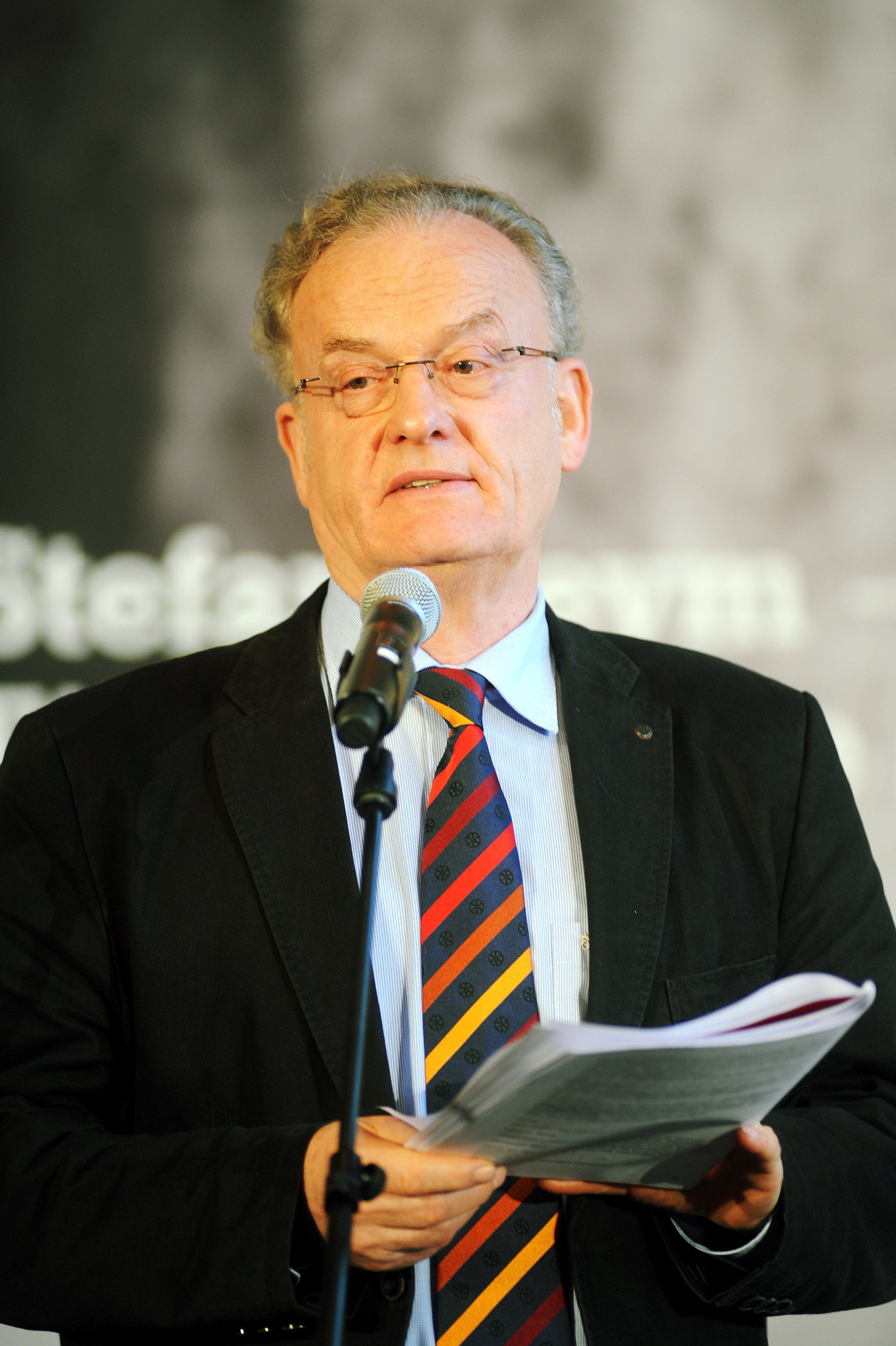 Berlin, 09.12.12 Szenische Lesung über "Stefan Heym - Einer,der nie schwieg" im Palais am Festungsgraben. Mit Friedrich Schorlemmer.. Foto. Ulli Winkler